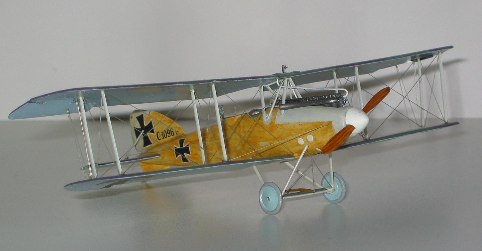 Albatros CXII.